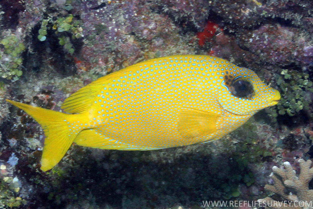 Siganus corallinus en isla Lizard, Australia